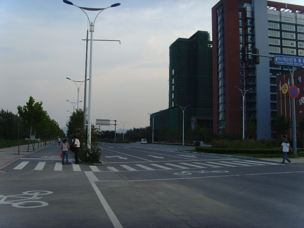 山东，济南，长清区，长清大学城街景